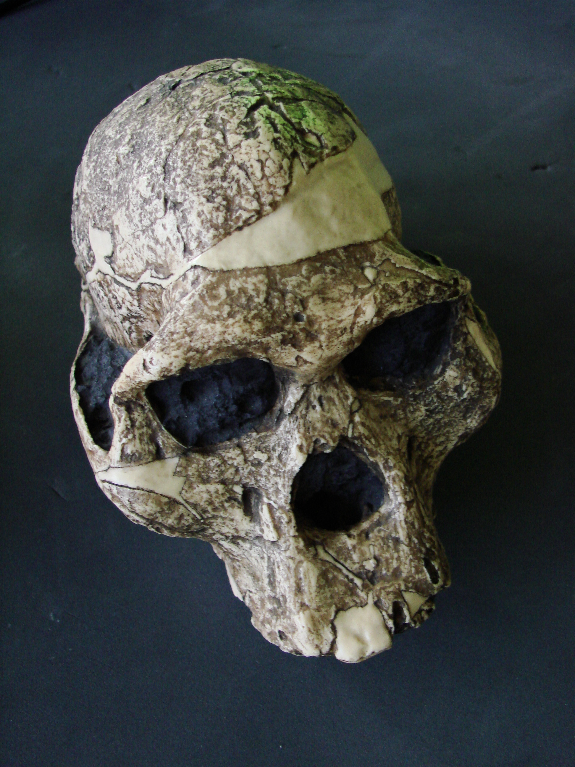 Muséum d'Anthropologie, campus universitaire d'Irchel, Université de Zurich (Suisse) : Australopithecus africanus (Sterkfontein, Afrique du sud)